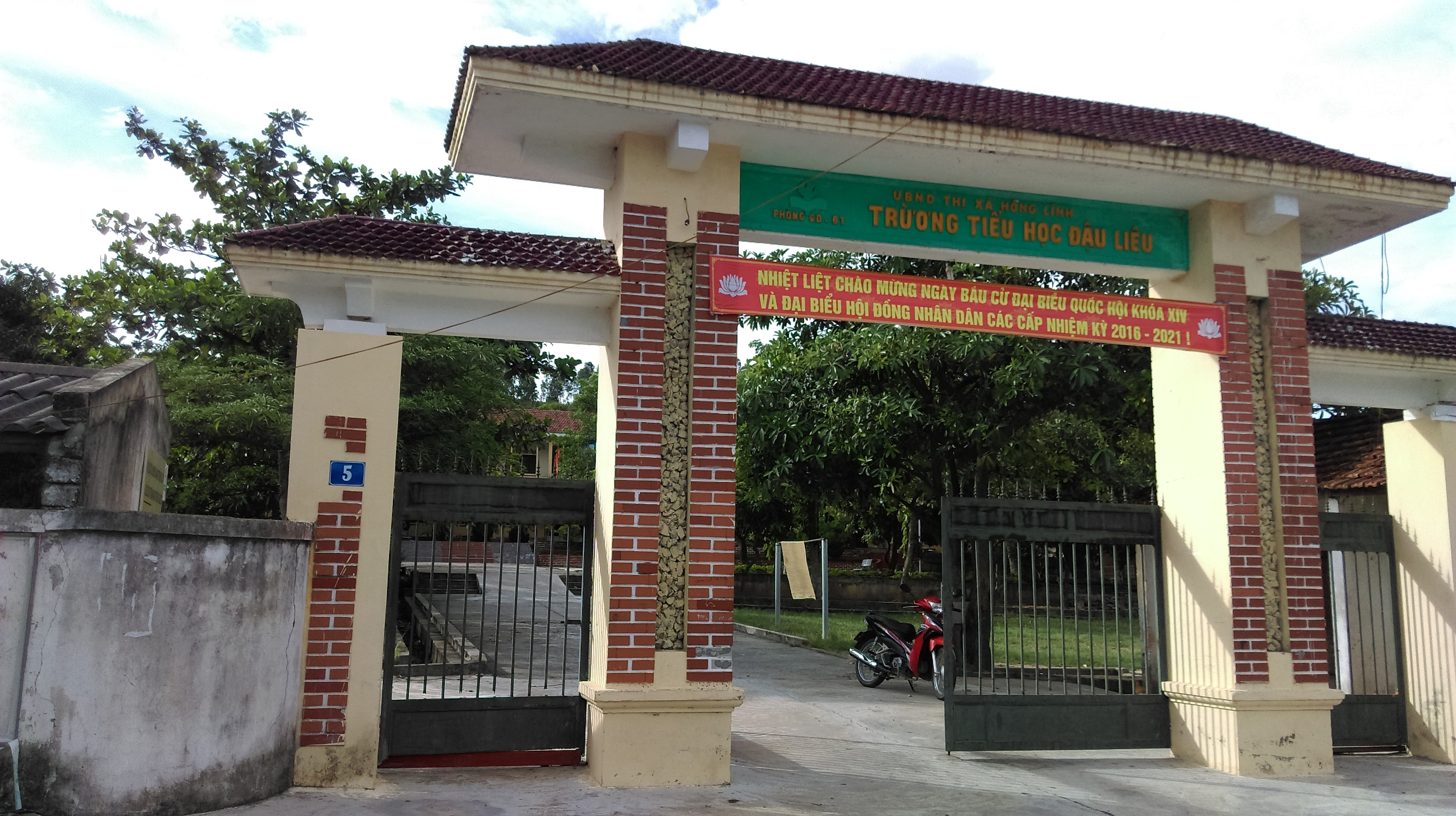 Trường Tiểu học Đậu Liêu, Hồng Lĩnh, Hà Tĩnh